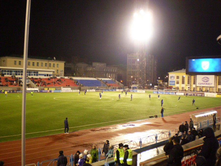 Стадион "Спартак" (Новосибирск), 4 ноября 2011 г. Сибирь-Факел